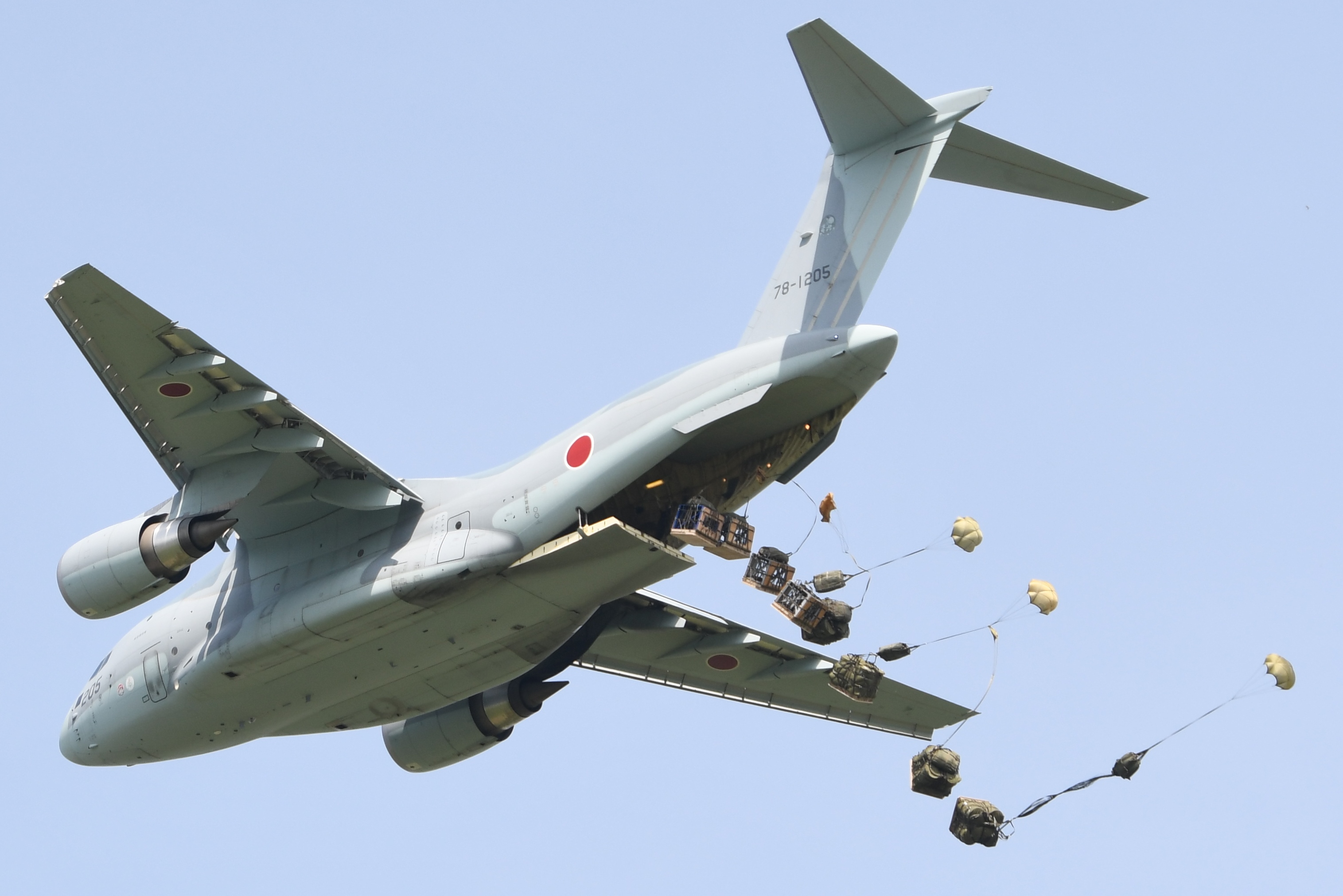 航空自衛隊 C-2輸送機（78-1205号機） PDS（プラットフォーム・デリバリー・システム）空中投下デモンストレーション。2018年5月27日 美保基地にて。